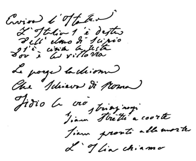 manoscritto originale, conservato nell’Archivio dell’Istituto Mazziniano di Genova. prima strofa inno Fratelli d'Italia